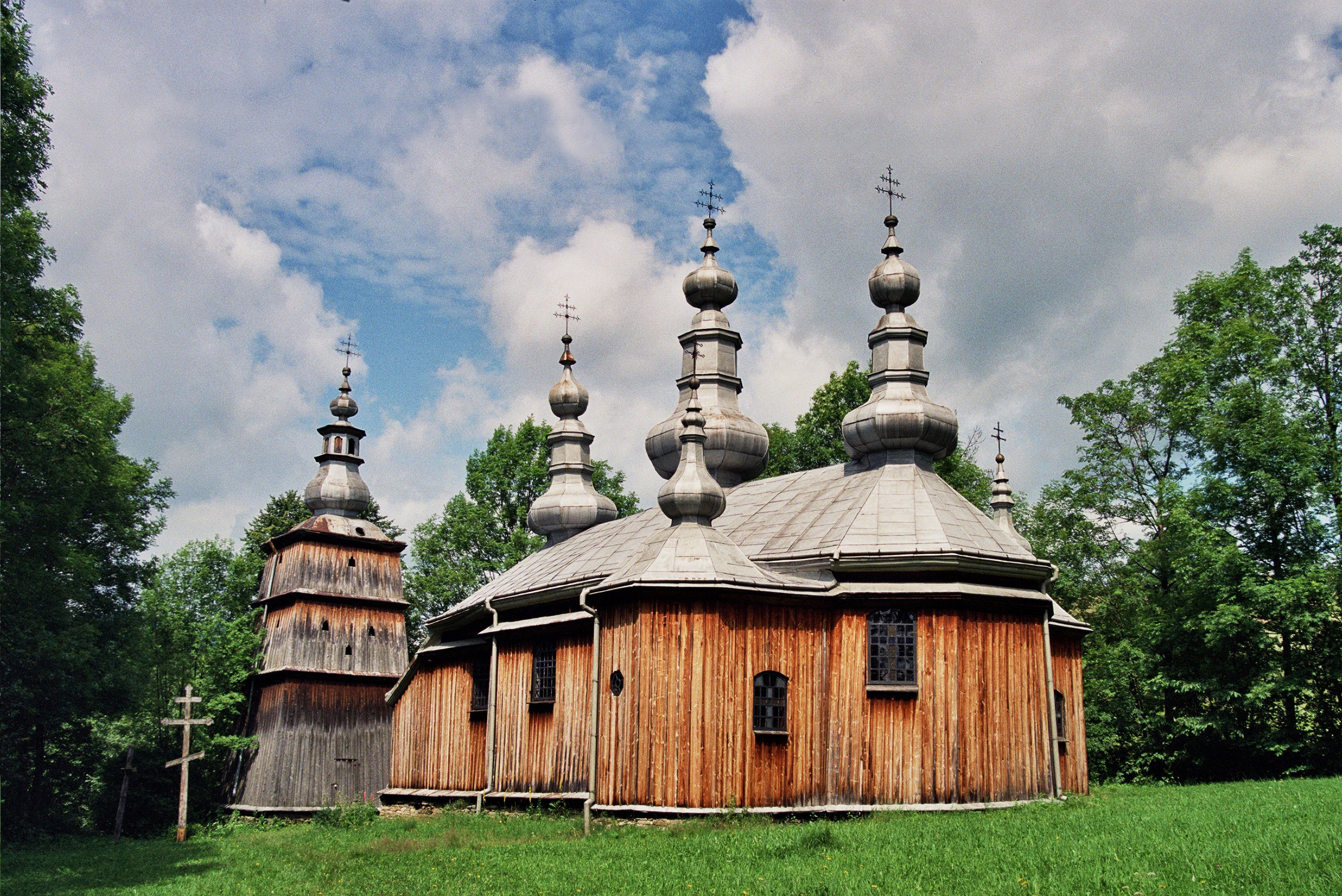 cerkiew greko-kat., ob. prawosławna p.w. św. Michała Archanioła., drewn., 1801woj. podkarpackie